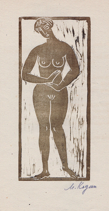 Moissey Kogan. Illustration für das Buch Jizo. Galerie Flechtheim, Berlin 1922